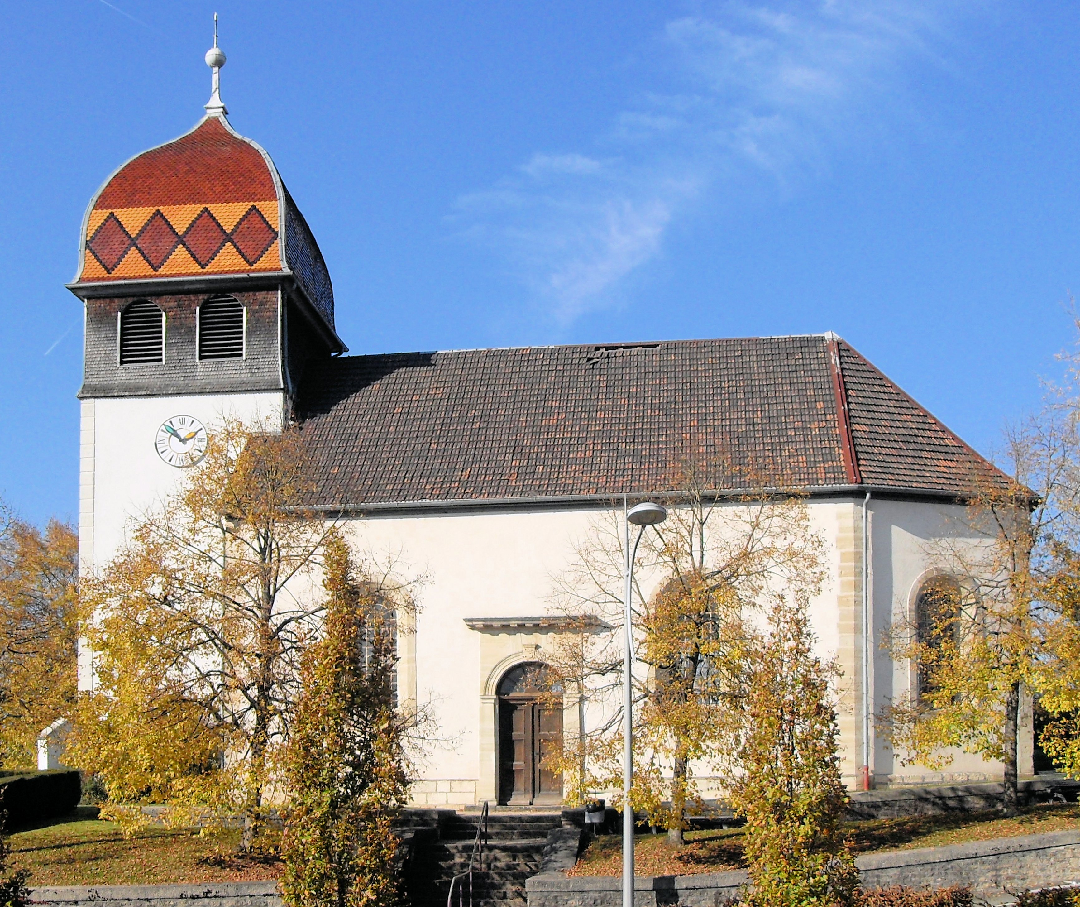 Le temple protestant d'Étupes